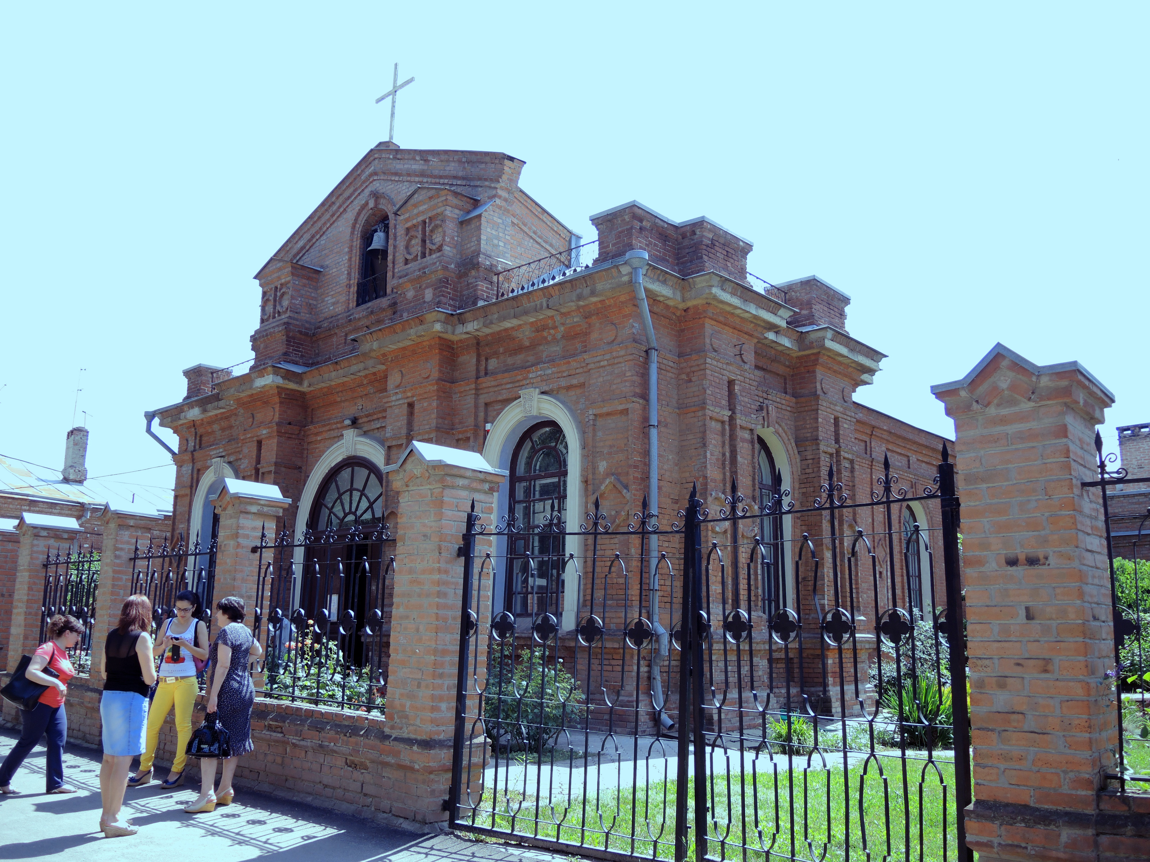 Костел: улица Просвещения, 143, Новочеркасск, Ростовская область